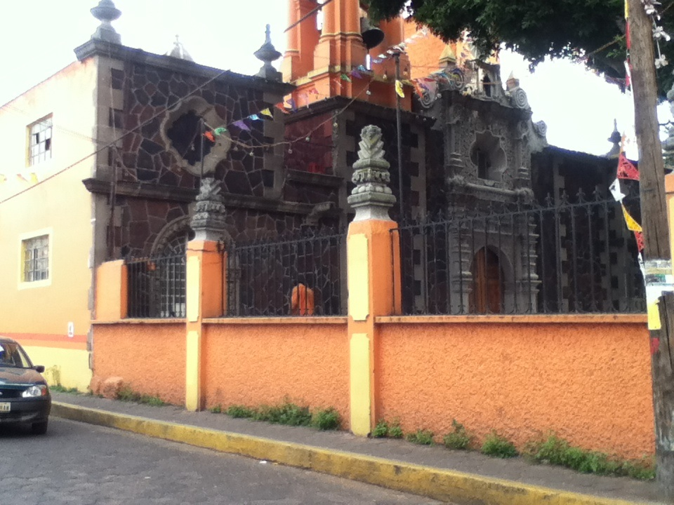 Templo de san Juan Bautista, san Juanico nextipac